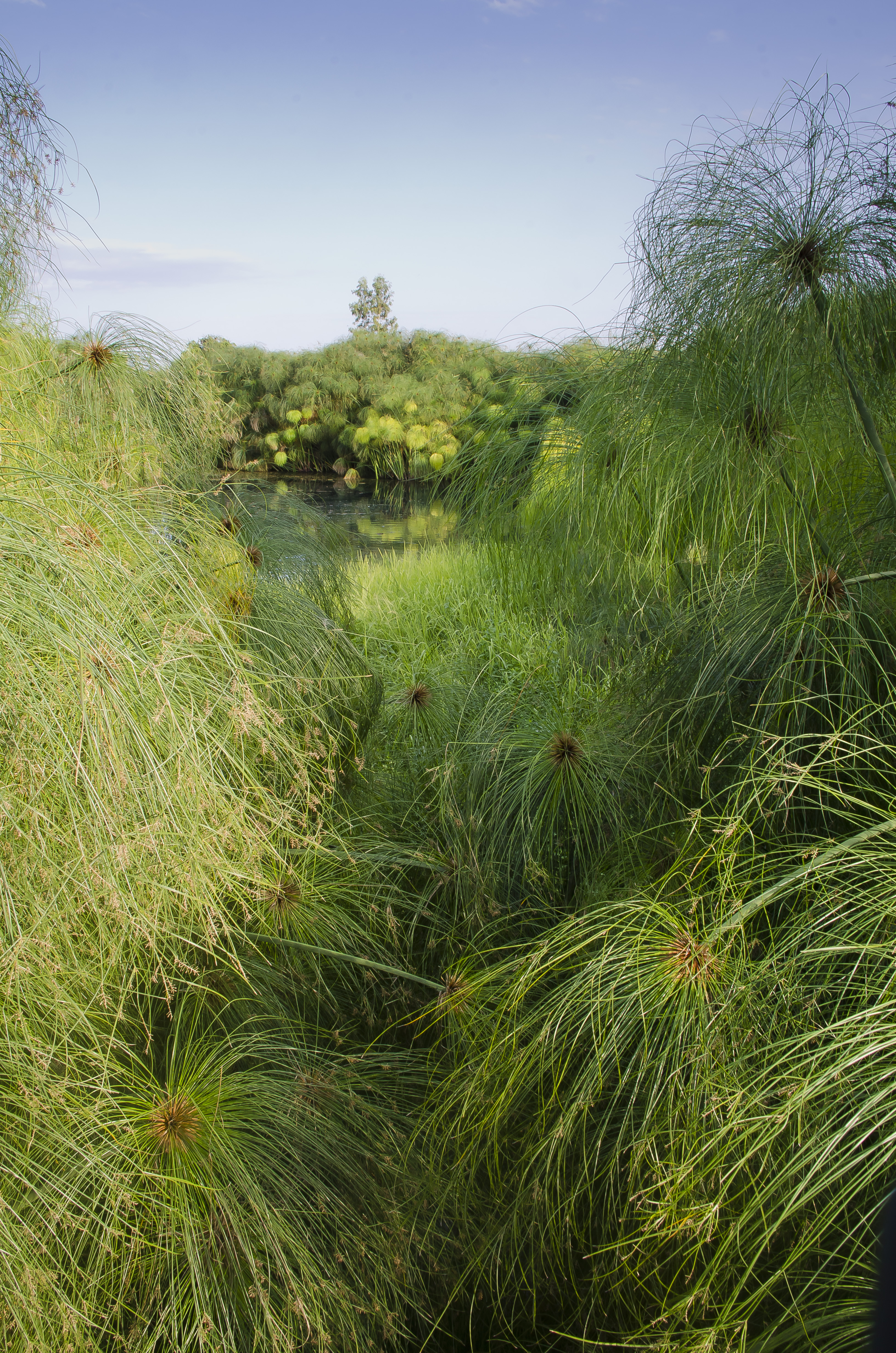 Papyrus Sedge (Cyperus papyrus), Riserva Naturale Orientata Fiume Ciane - Saline di Siracusa, near Siracusa, Sicily